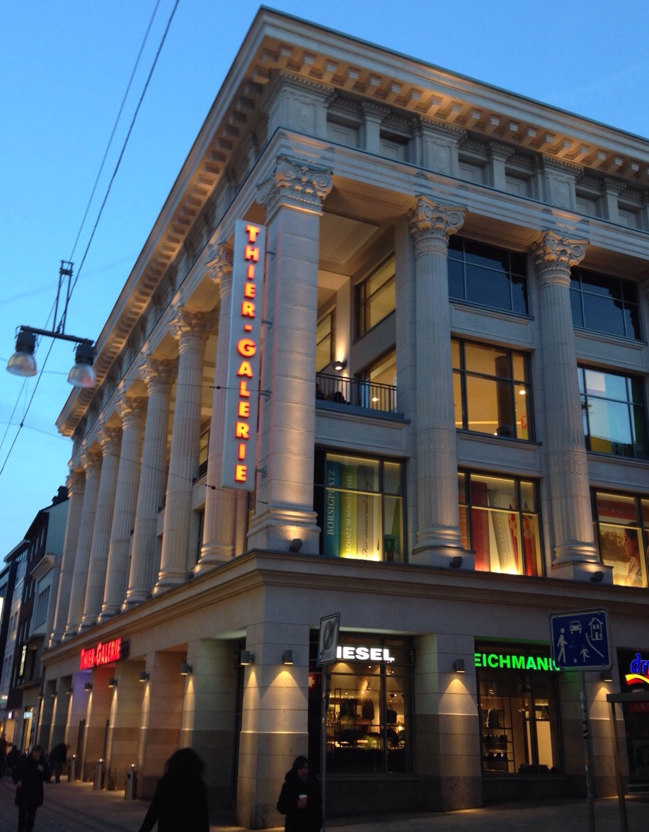 Thier-Galerie Blickrichtung Westenhellweg